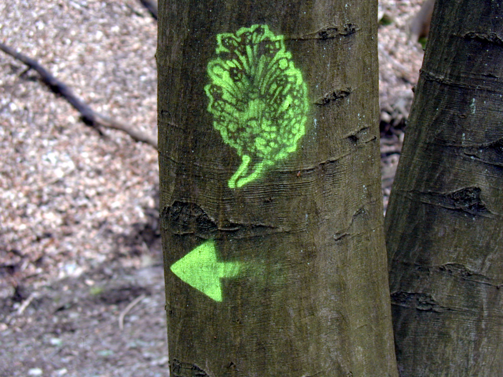 Wegzeichen eines Arboretumswegs im Burgholz, Wuppertal